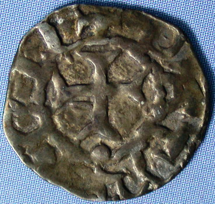 monnaie émise par John de Courcy, dédiée à saint Patrick